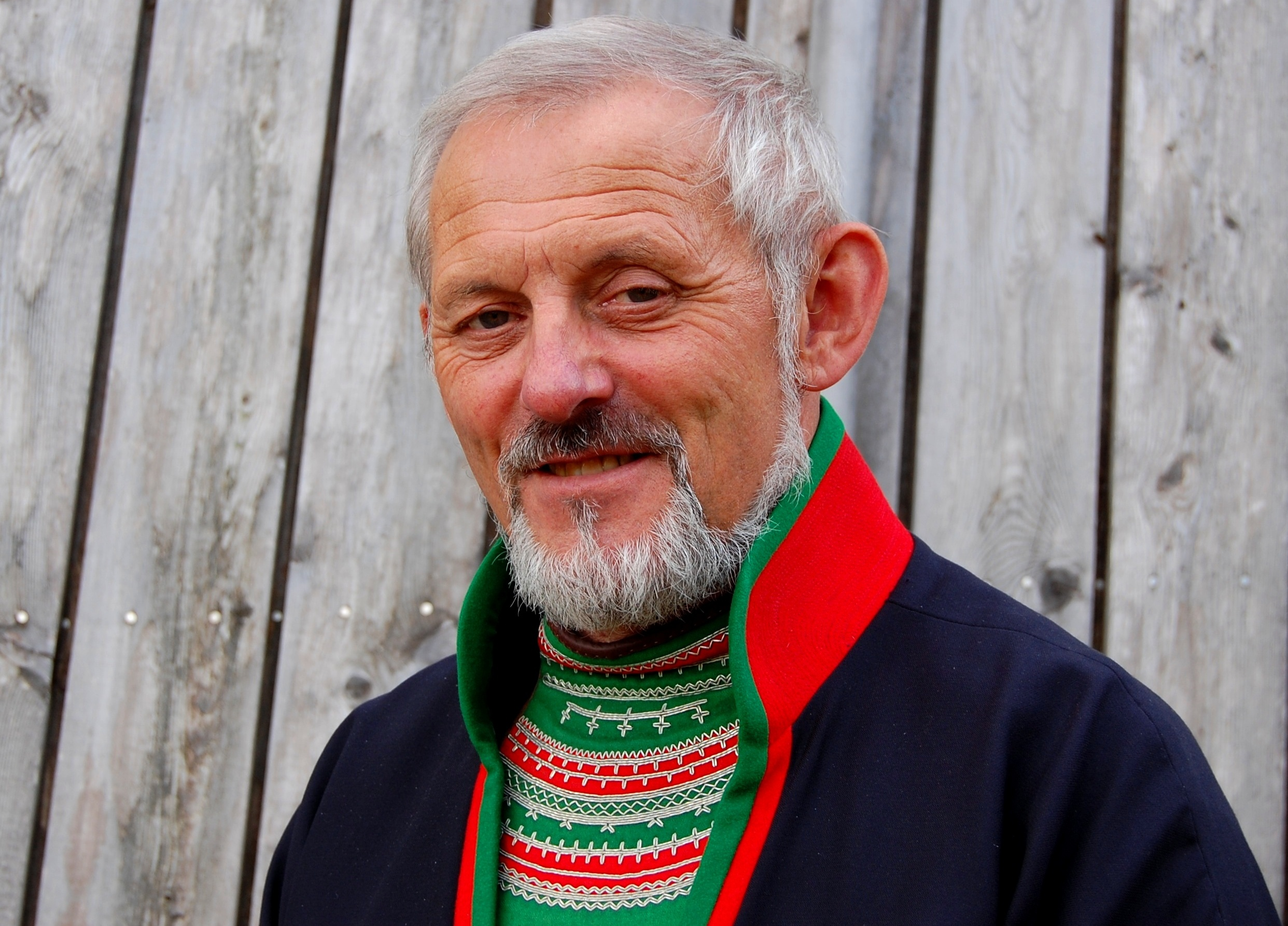 Jarle Jonassen er sametingsrepresentant fra sørsameområdet for Norske Samers Riksforbund (NSR).